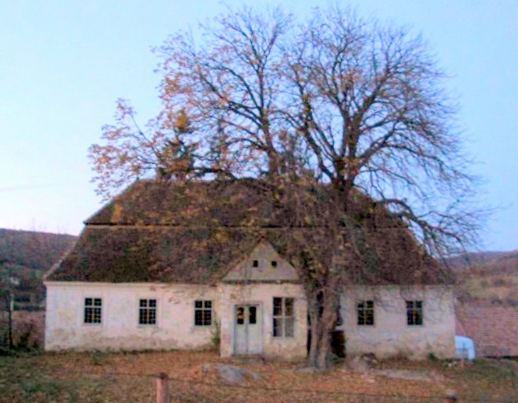 Conacul Babós - Forró, sat Pădureni; comuna Moacșa 30 1825